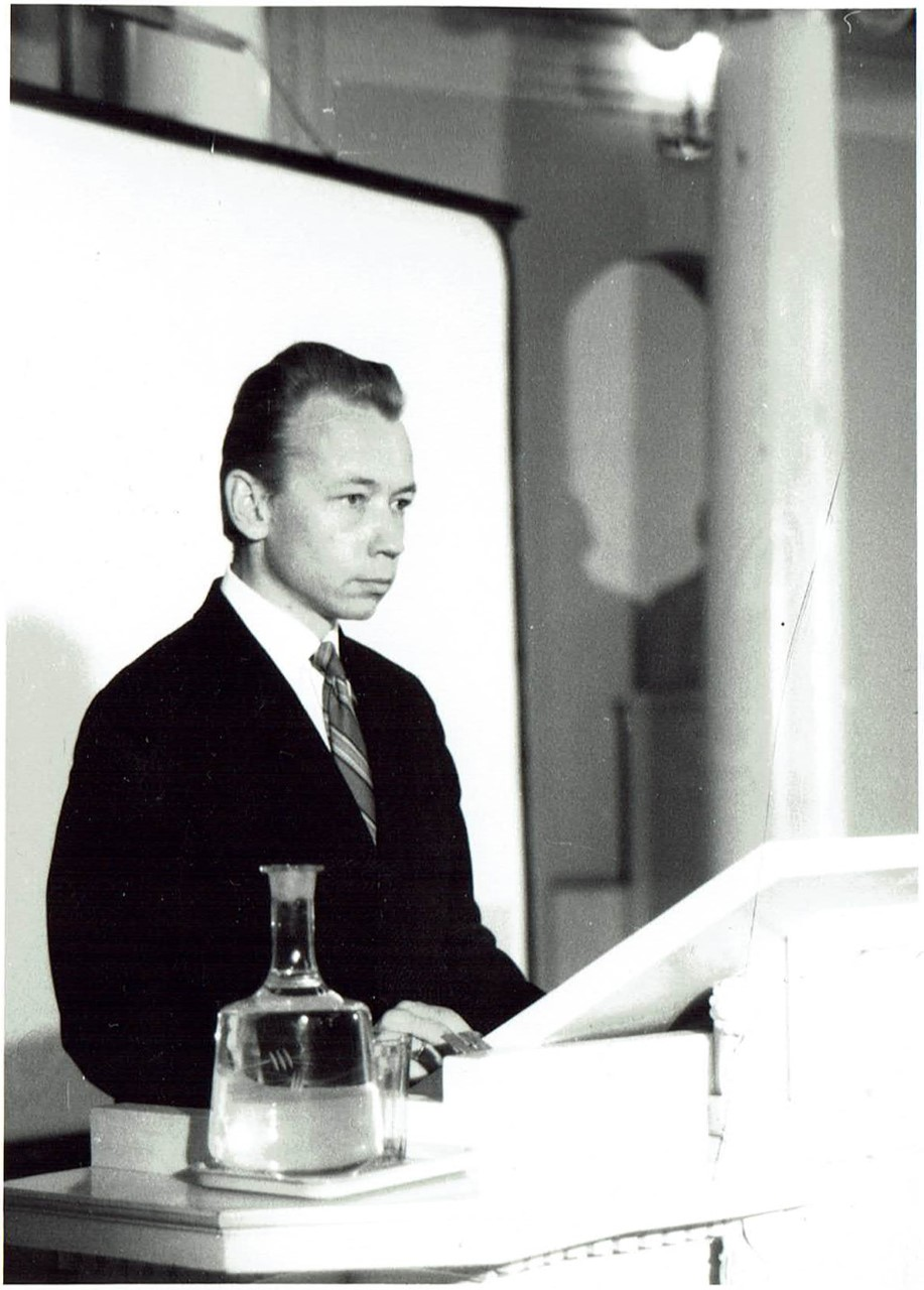 Mart Elango doktoritöö kaitsmine Tartu Riikliku Ülikooli aulas 12. jaanuaril 1973